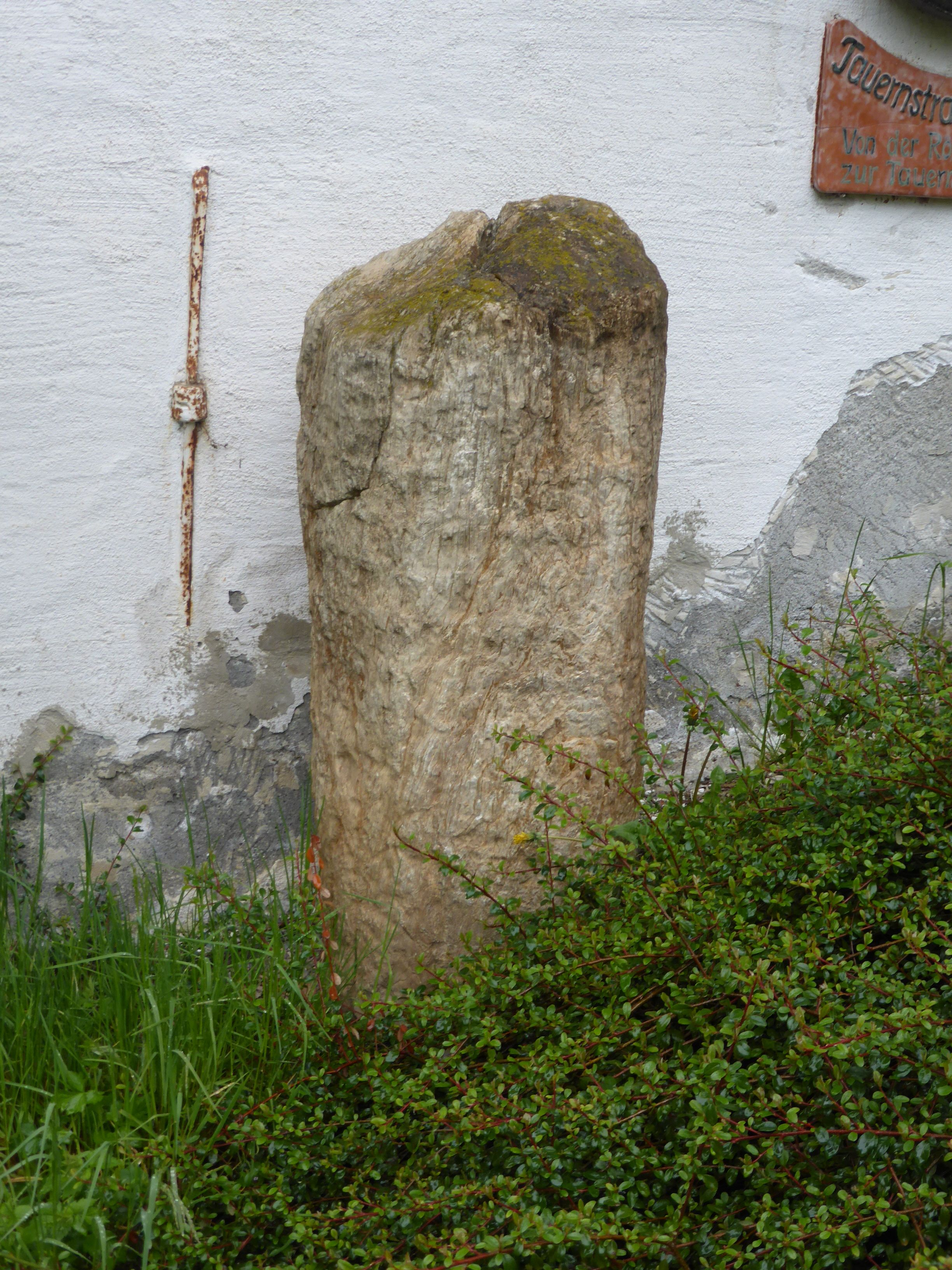 Fürstenkasten; Tauernstraßenmuseum